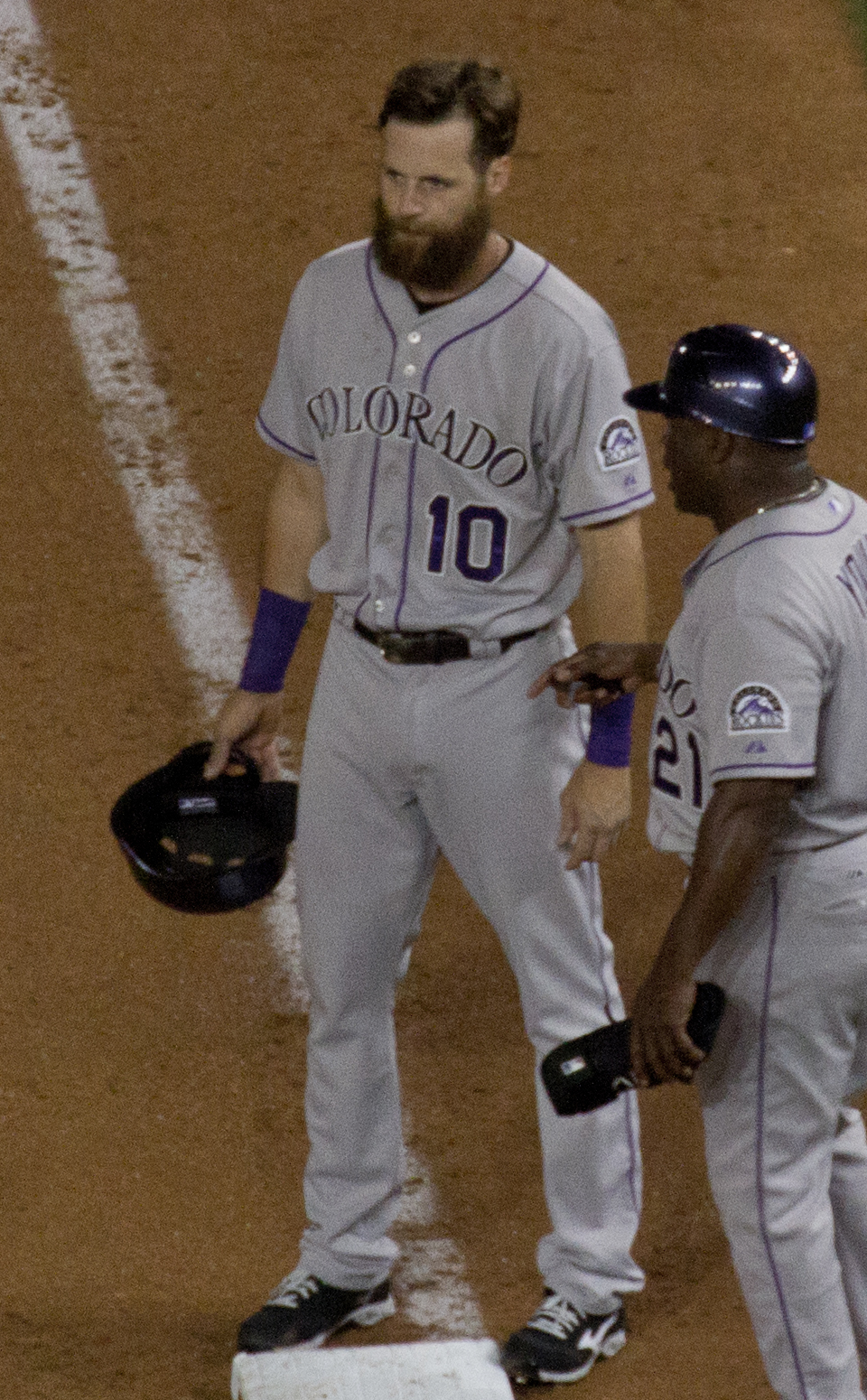 Ben Paulsen